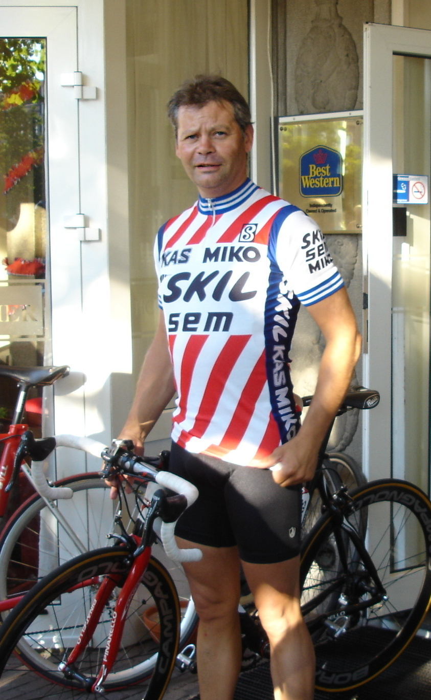 Wielrenner Jac van Meer